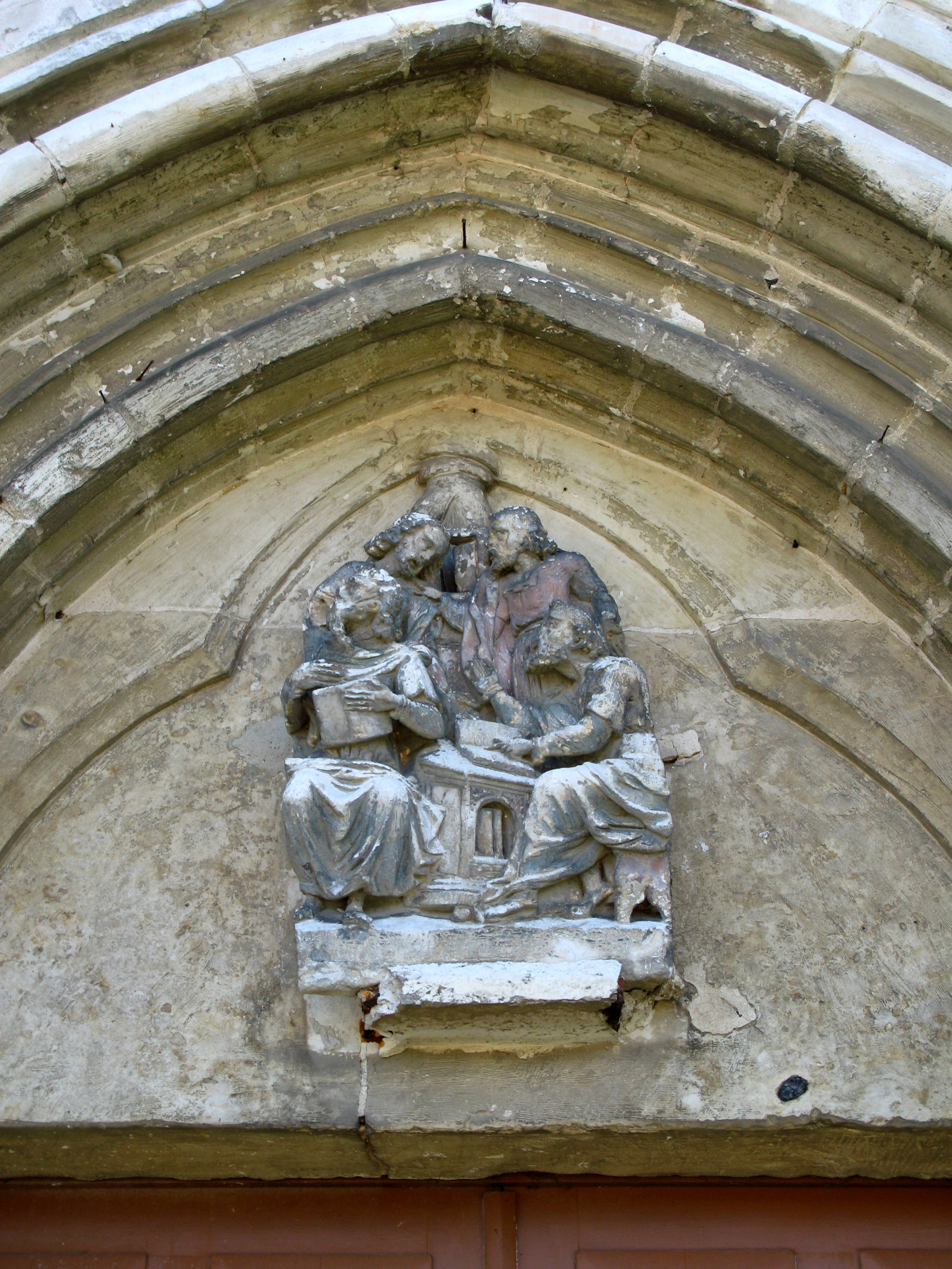 Camps-en-Amiénois (Somme, France) - Façade Sud de l'église Saint-Nicolas. Le tympan avec les 4 évangélistes. On remarque que les vêtements des 2 personnages du fond portent encore des traces de couleurs. Dans sa description de l'édifice en 1850, l'abbé Daire ne mentionne, comme motif en haut-relief au-dessus du portail, qu' une « main pendante bénissant de deux doigts ». Si le haut de la main (donc le poignet) semble encore visible de nos jours, le reste est caché par ce groupe de 4 personnages, qui semble en effet avoir été rapporté et scellé ultérieurement. Cet ajout aurait-il été justifié par un très mauvais état du décor initial ? (remplacement simple ... ou cache-misère ?).